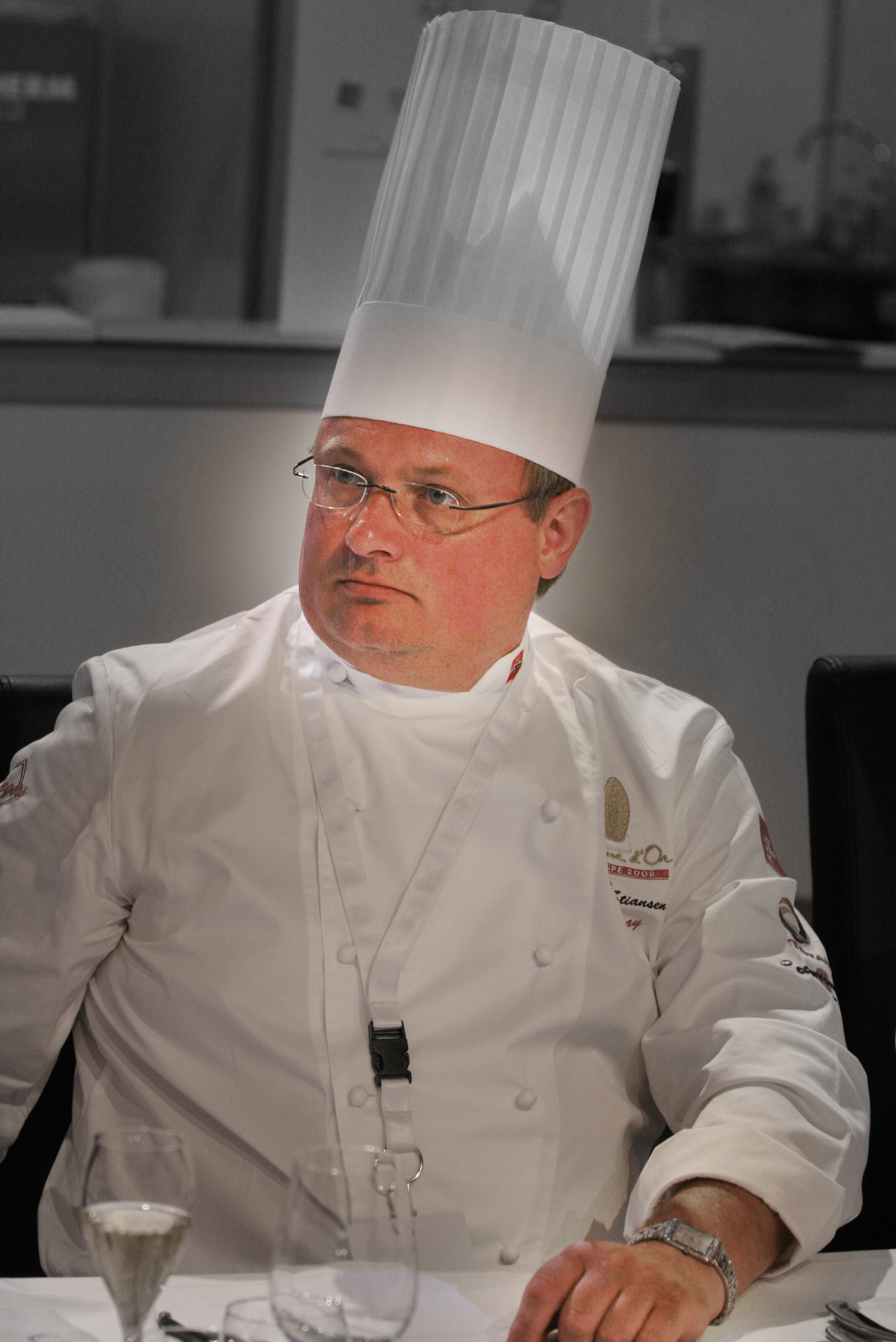 Bent Stiansen, norsk kokk - vinner av Bocuse d'Or